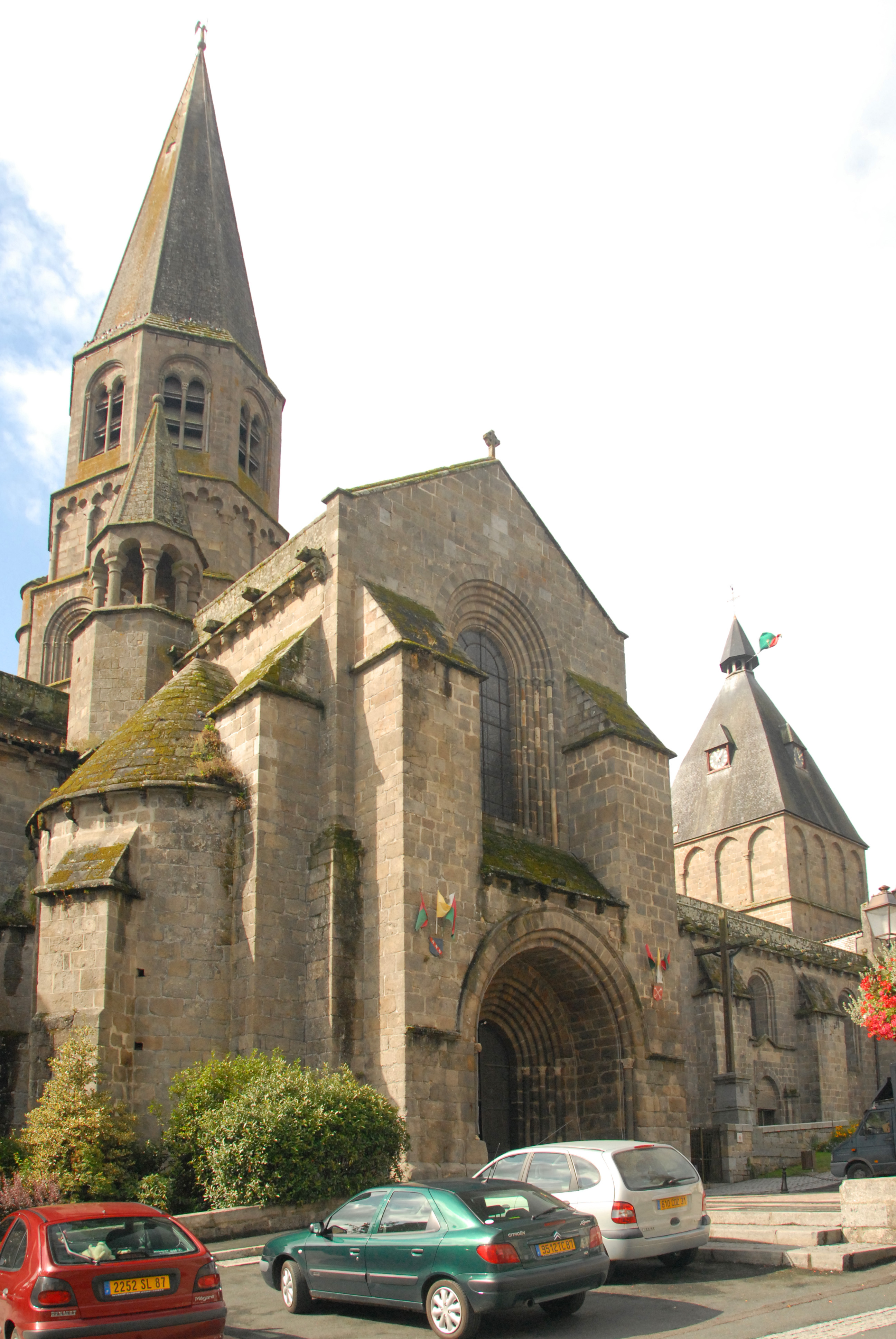 St-Pierre de Le Dorat, nördl. Querhausarm m. Vierungsturm von NO